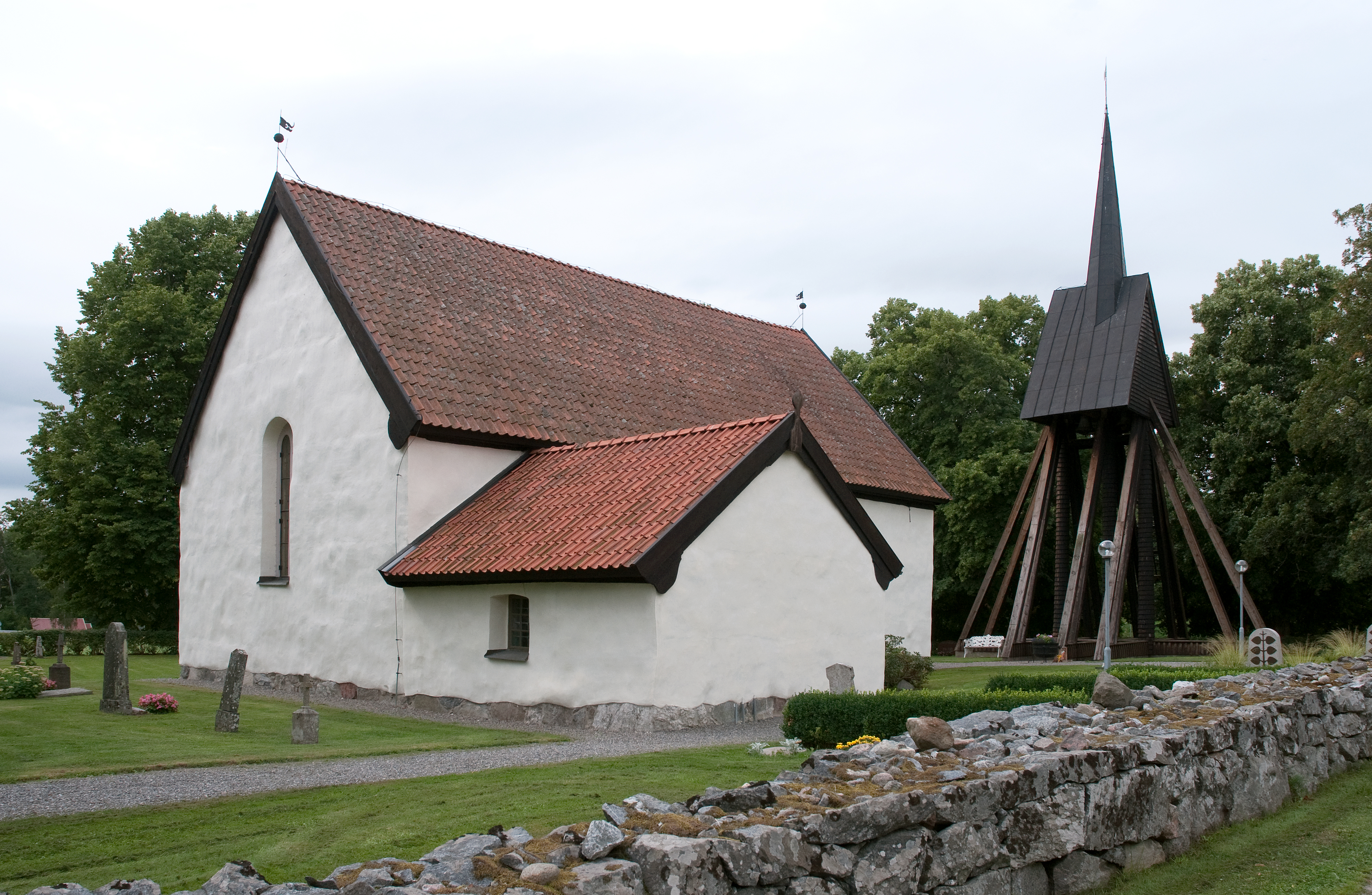 Vrena kyrka i Nyköpings kommun.